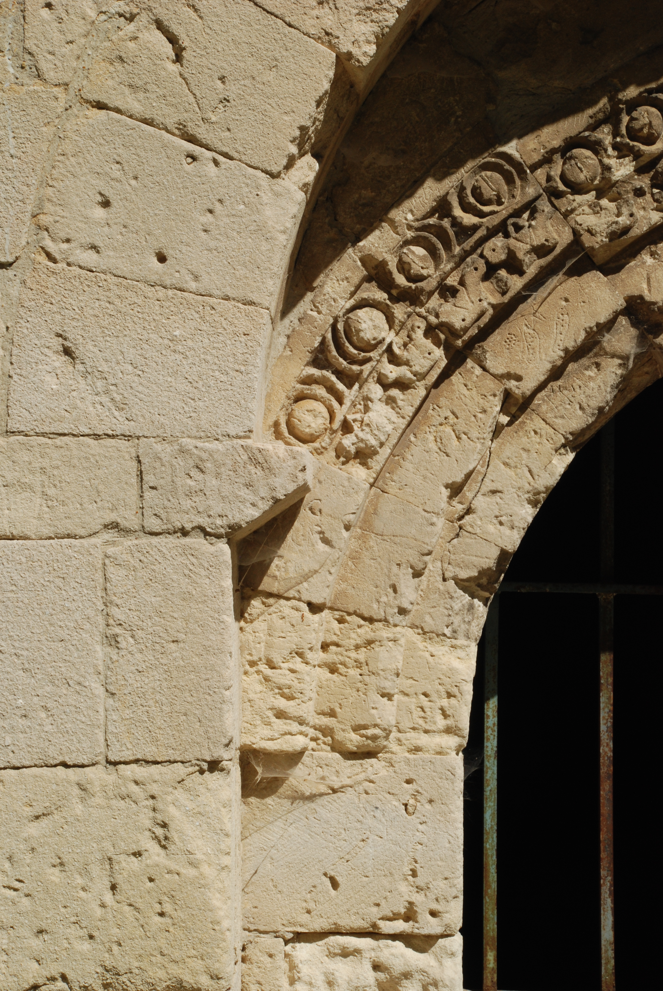 France - Drôme - La Garde-Adhémar - prieuré bénédictin du Val des Nymphes